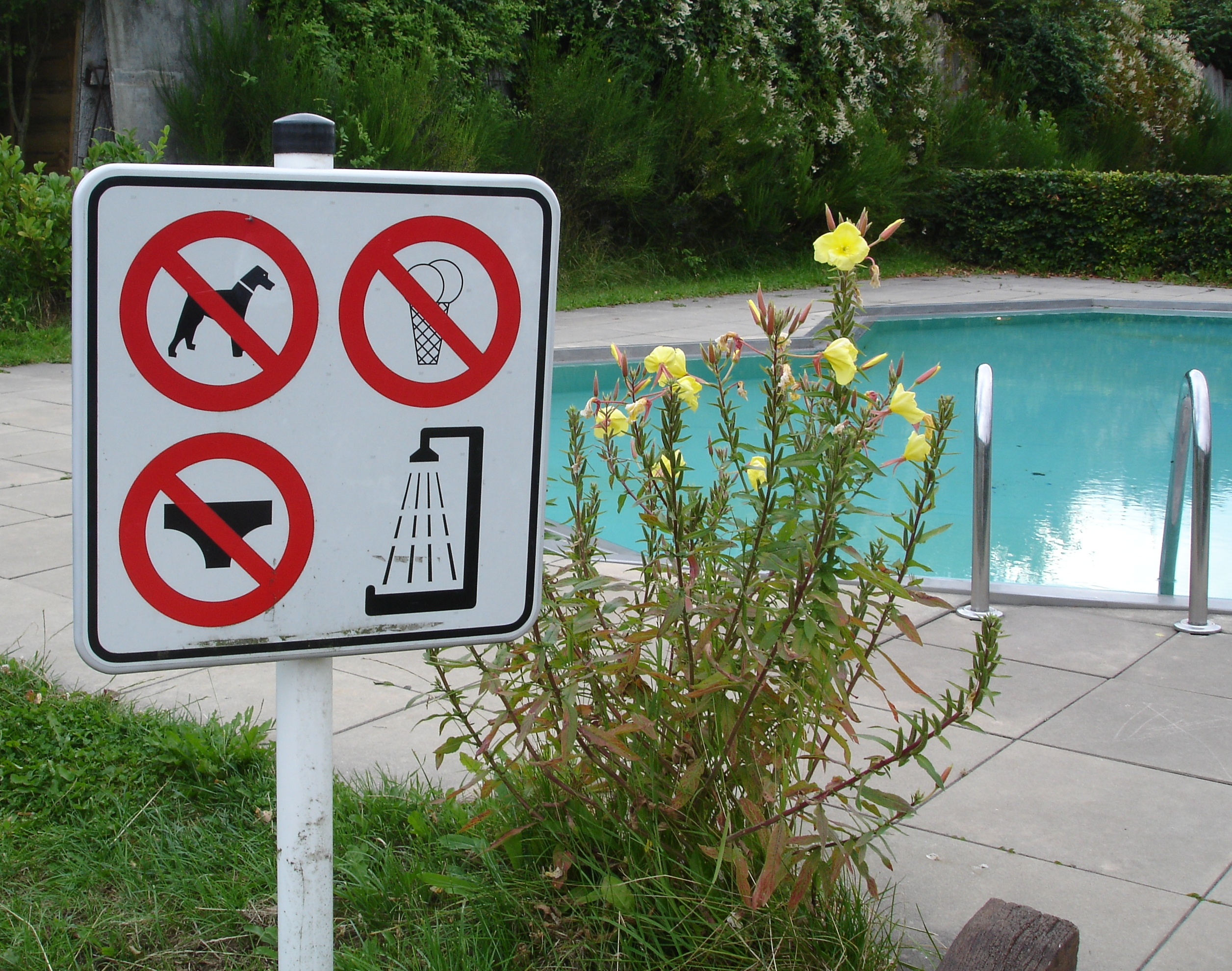 Cozzies forbidden